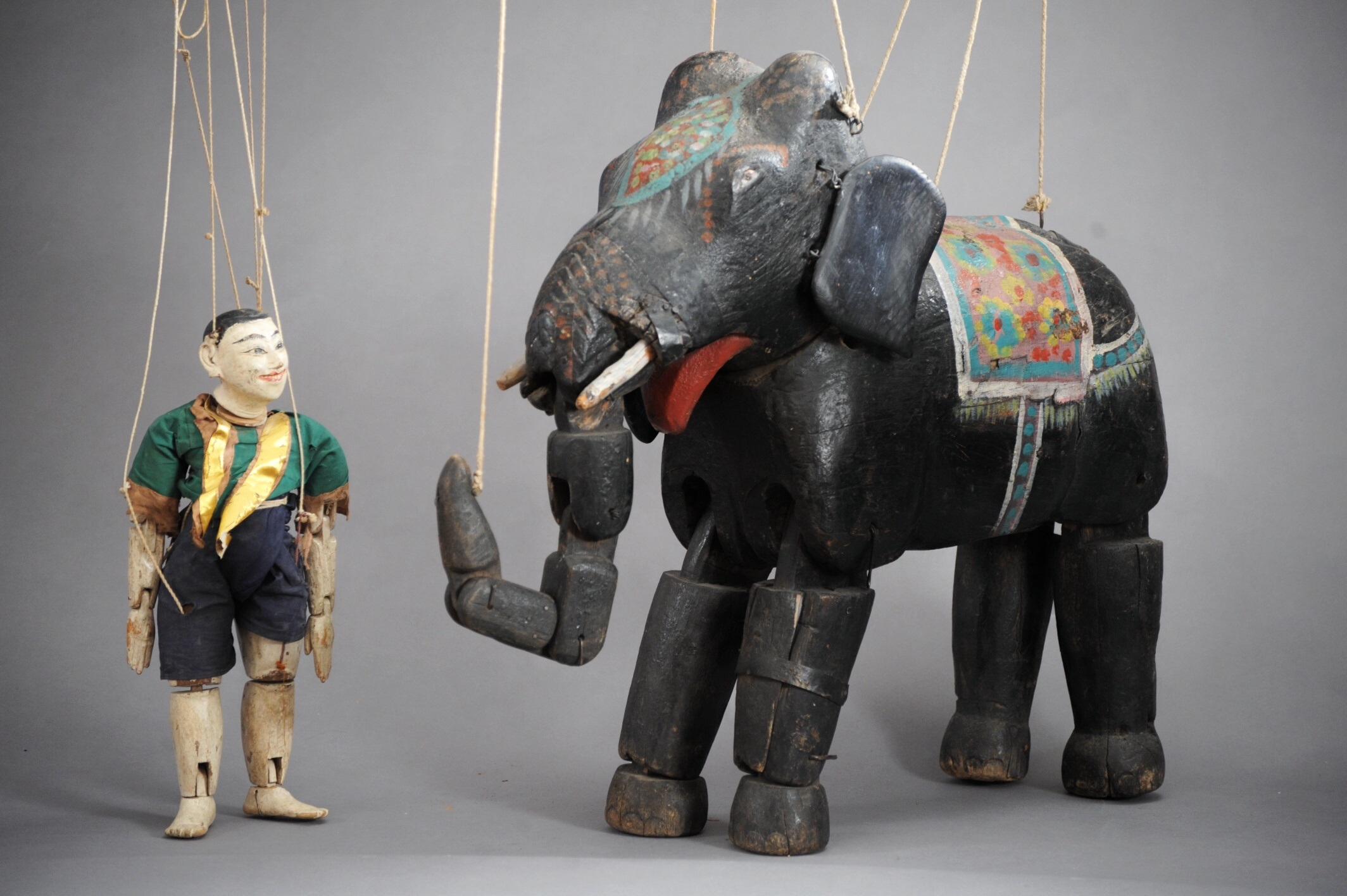 Elefant und junger Mann, Marionetten Ende 19 Jh., Burma (Myanmar)